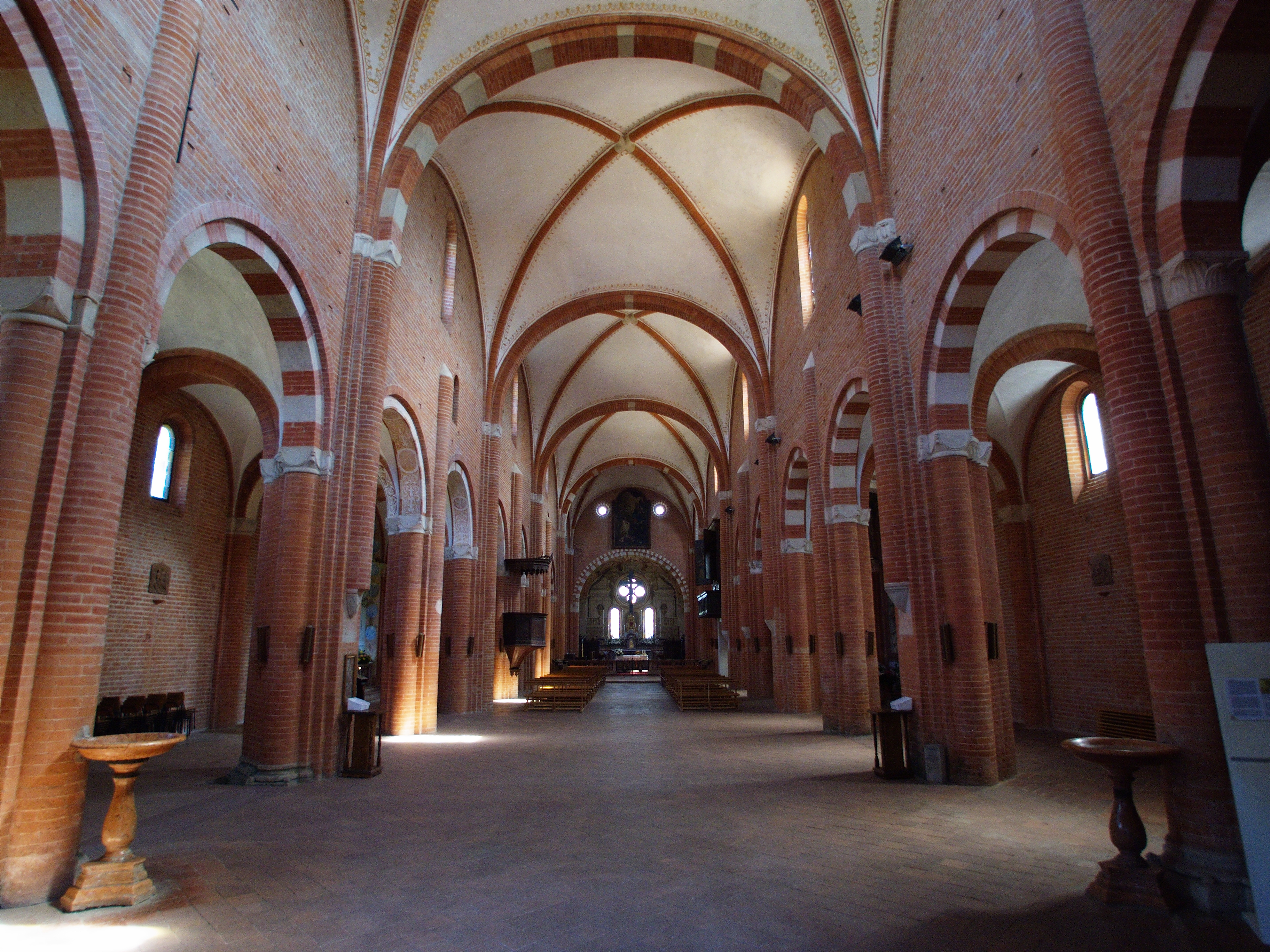 Abbazia di Chiaravalle della Colomba : Navata - Chiaravalle della Colomba : Nave